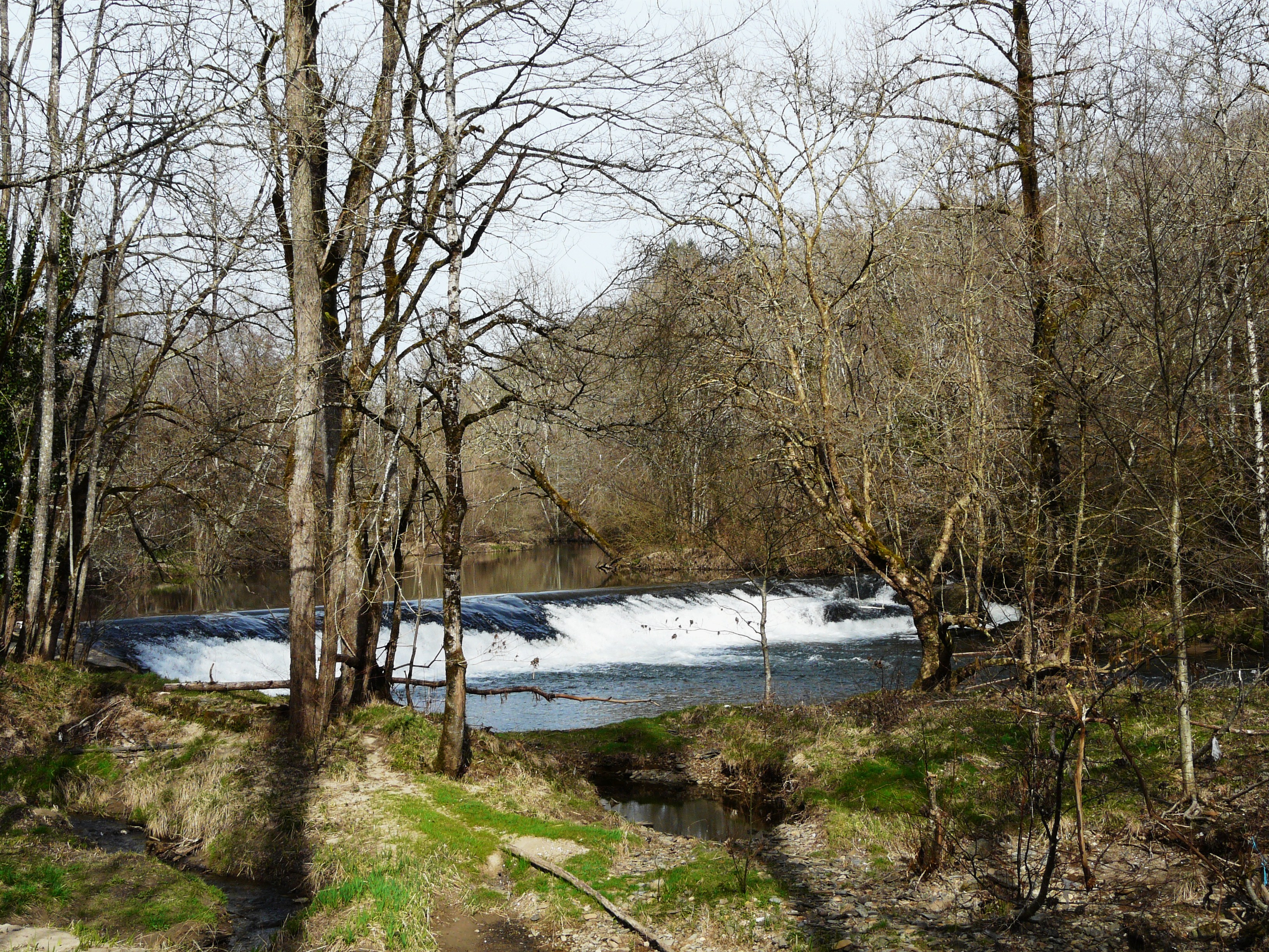 La retenue du moulin de Guimalet sur l'Auvézère, Anlhiac, Dordogne, France. La rive du second plan se situe sur la commune de Génis.